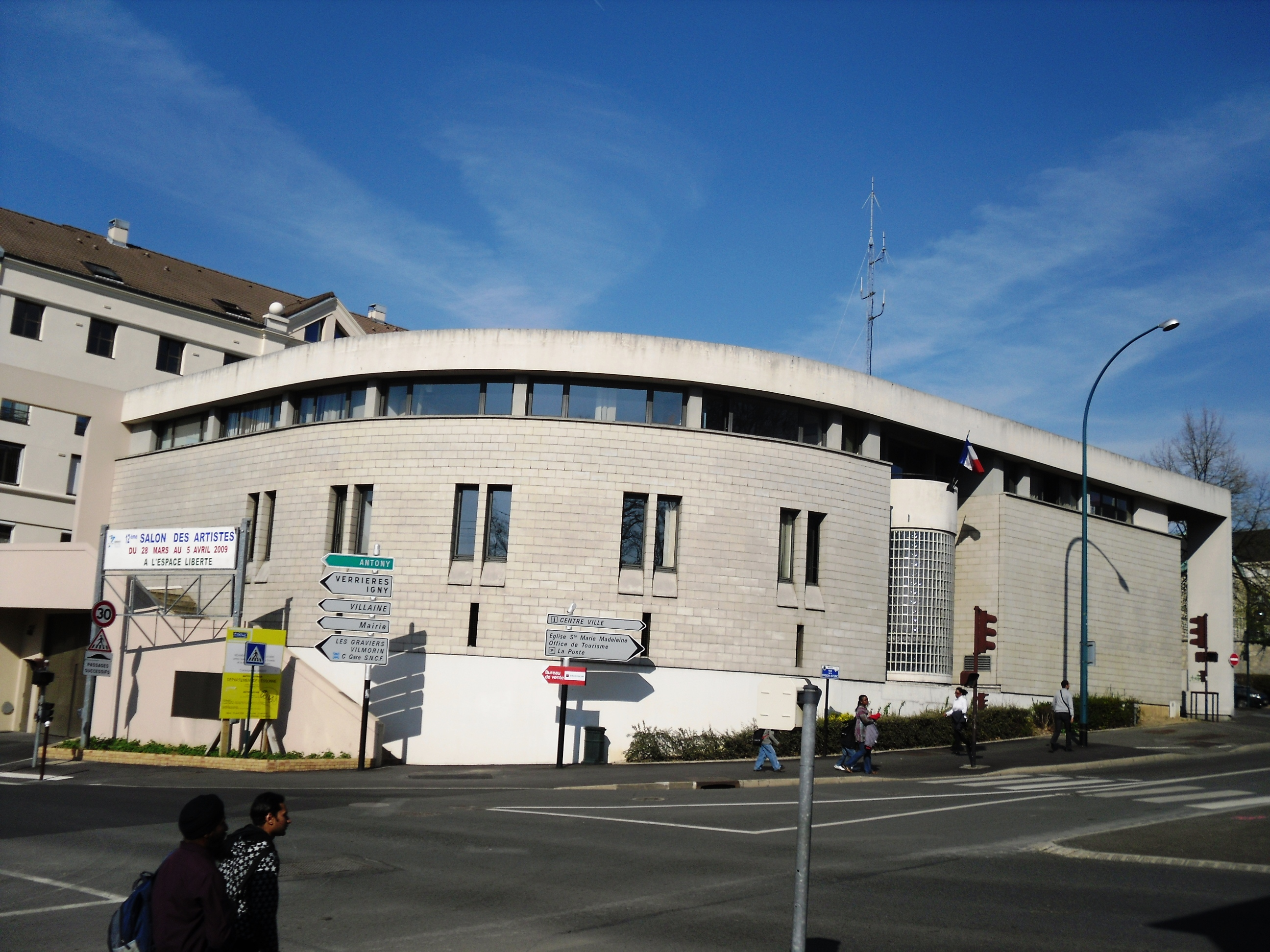 Le commissariat de police de Massy (91)